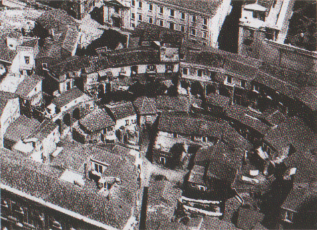 Il soggetto è il Teatro Romano di Catania, ritratto in una foto del 1930.